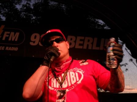 Rapper Rako beim "Graffitibox Jam Summer Festival" 2011 in Berlin